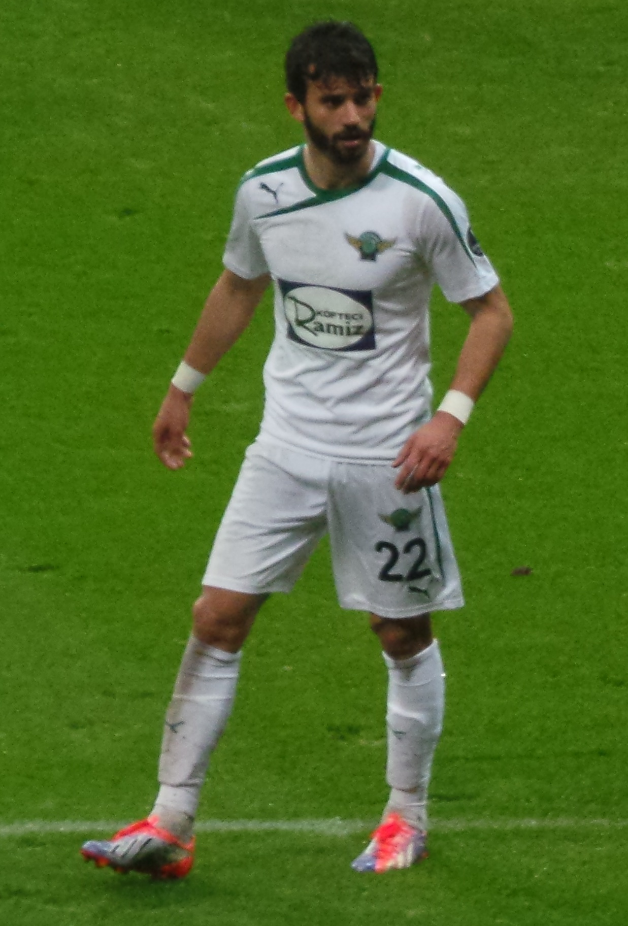 Güray vural'14